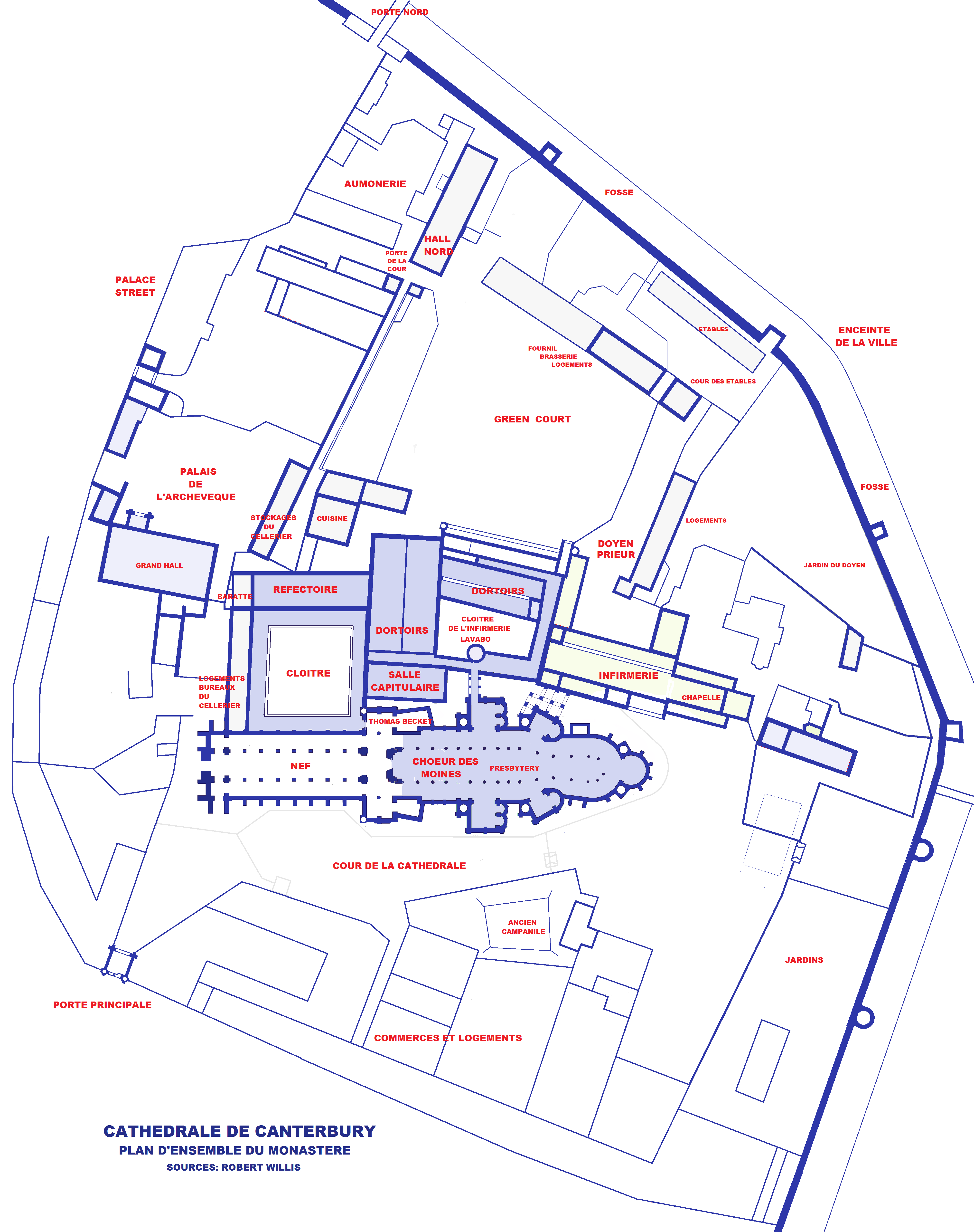 Cathedrale de Canterbury, plan d'ensemble